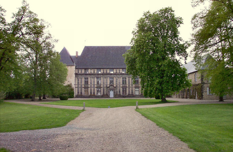 Le Château d'Effiat (Puy de Dôme, France)